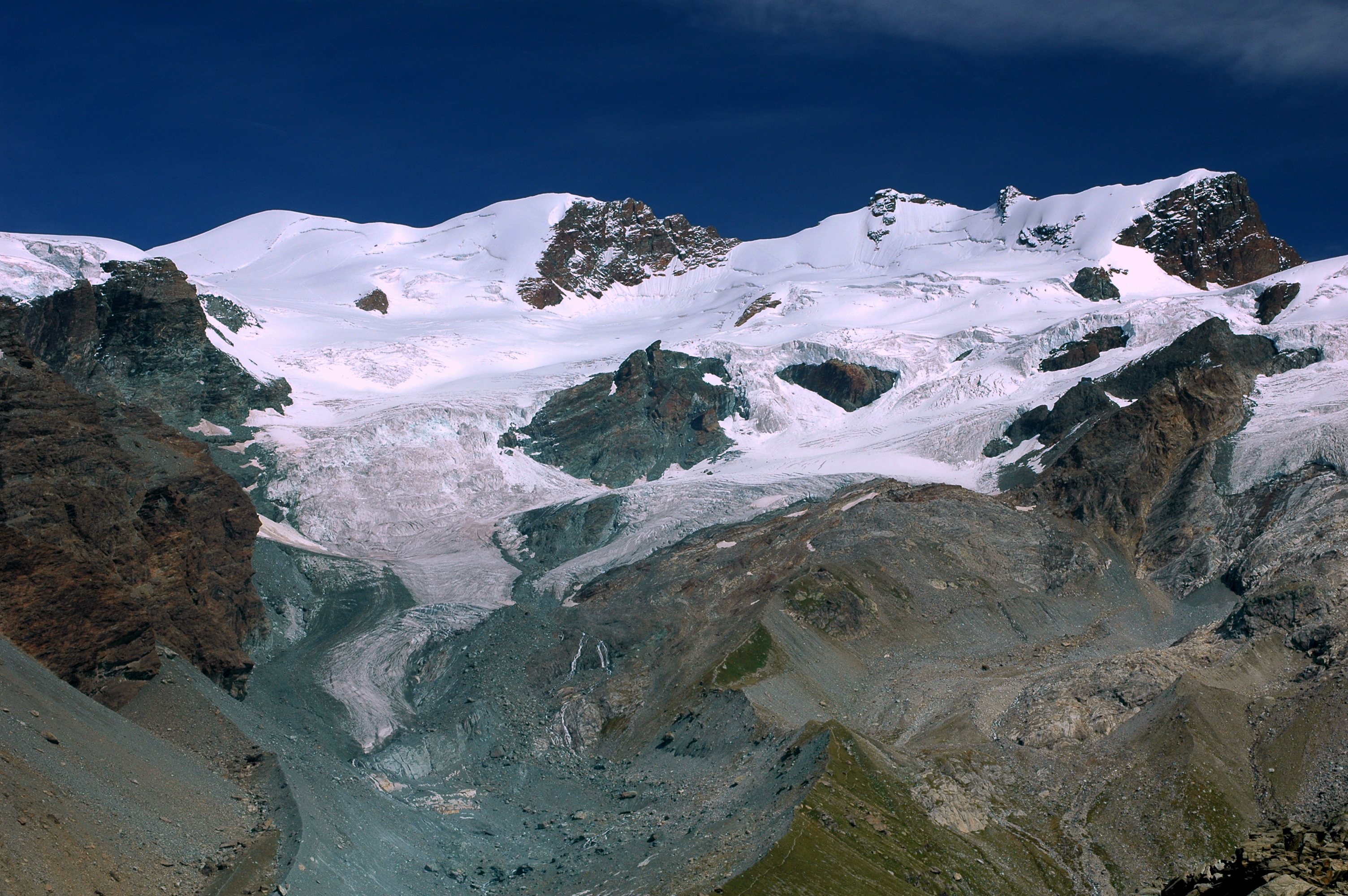 Monte Rosa da Champoluc con da sin. la catena dei Breithorn Occidentale m.4165, Breithorn Centrale m.4160 e all'estrema destra la Roccia Nera